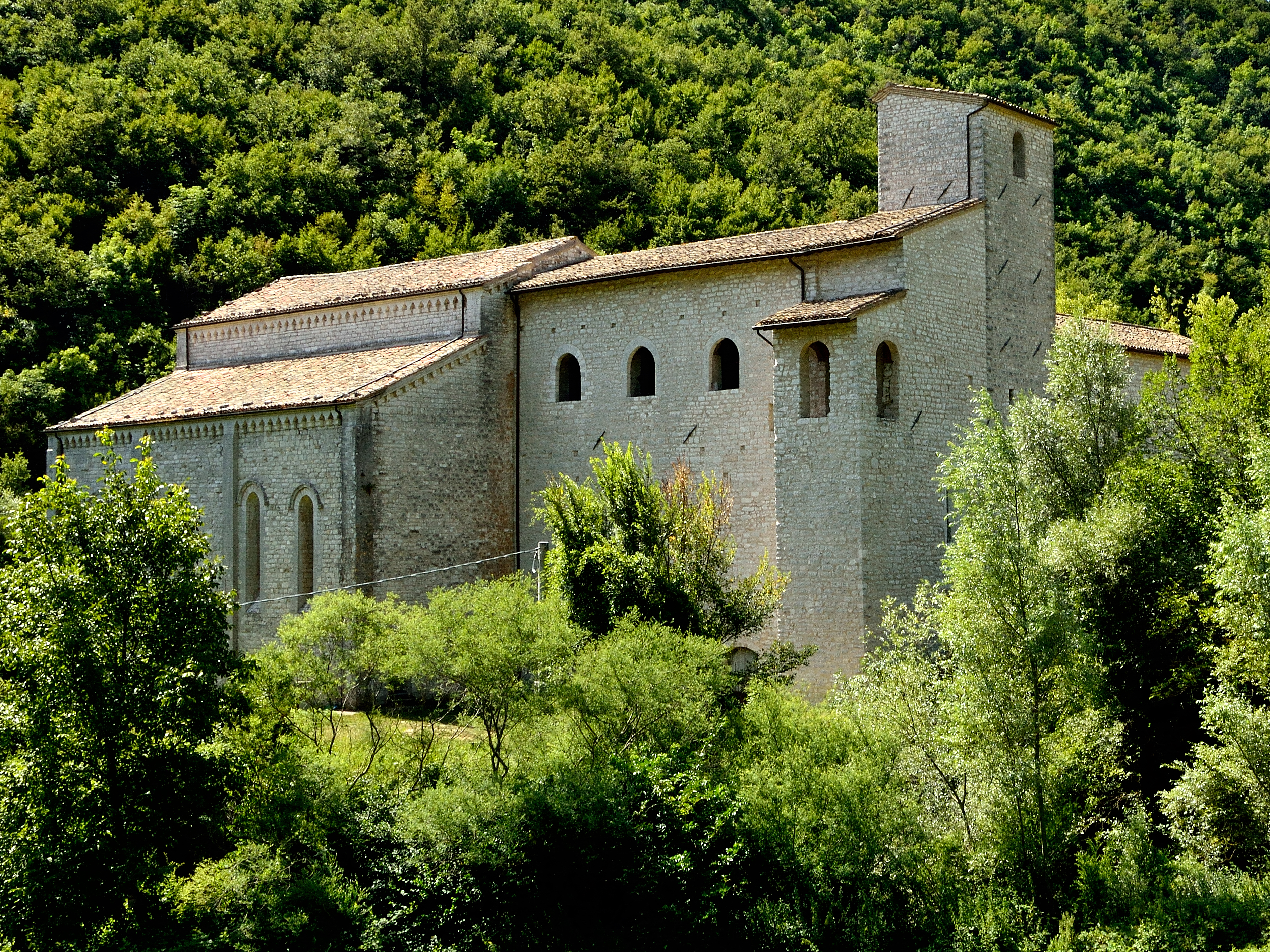 Abbazia di Sant'Emiliano in Congiuntoli esterno